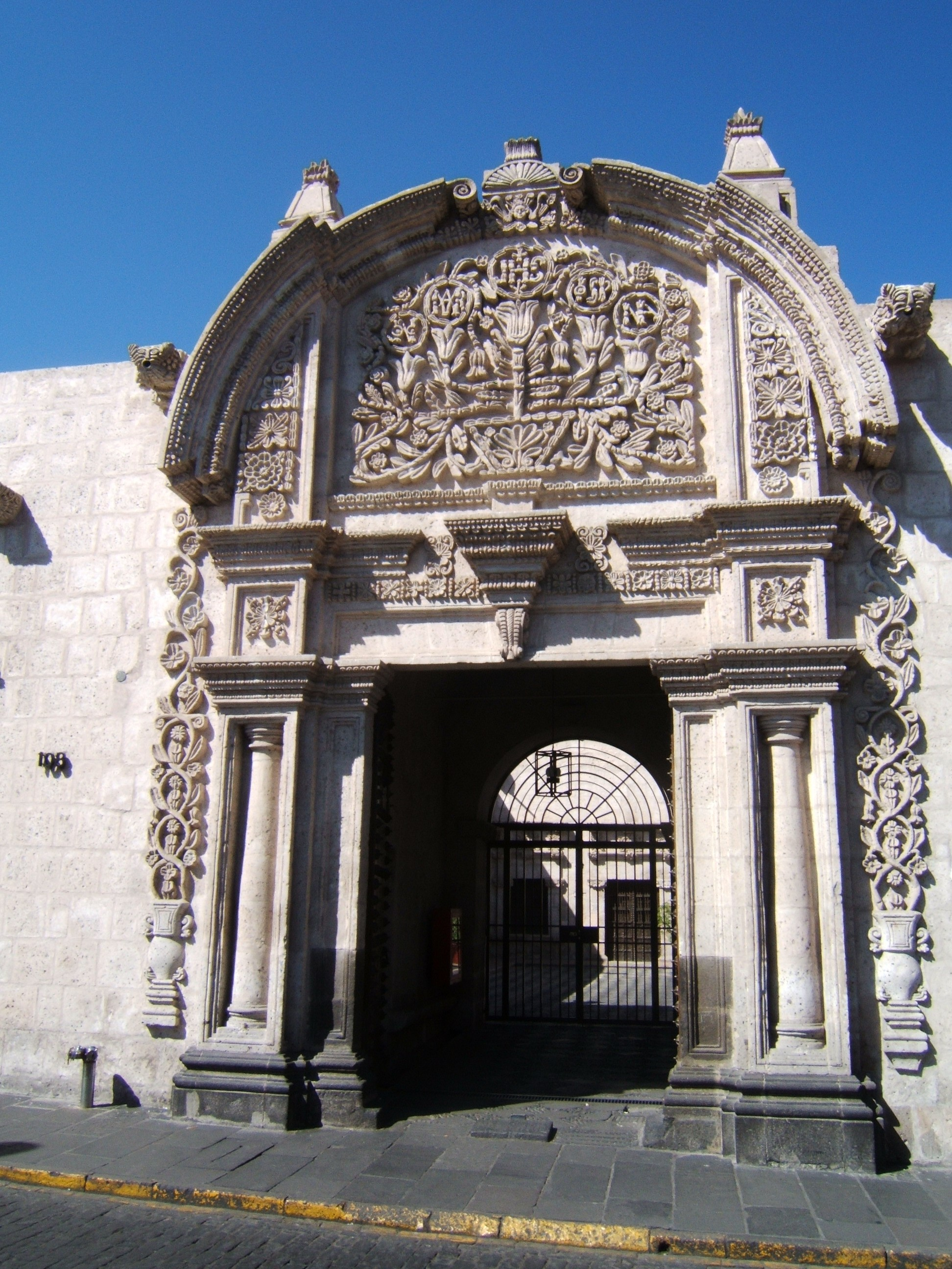 De ingang van Casa Ricketts